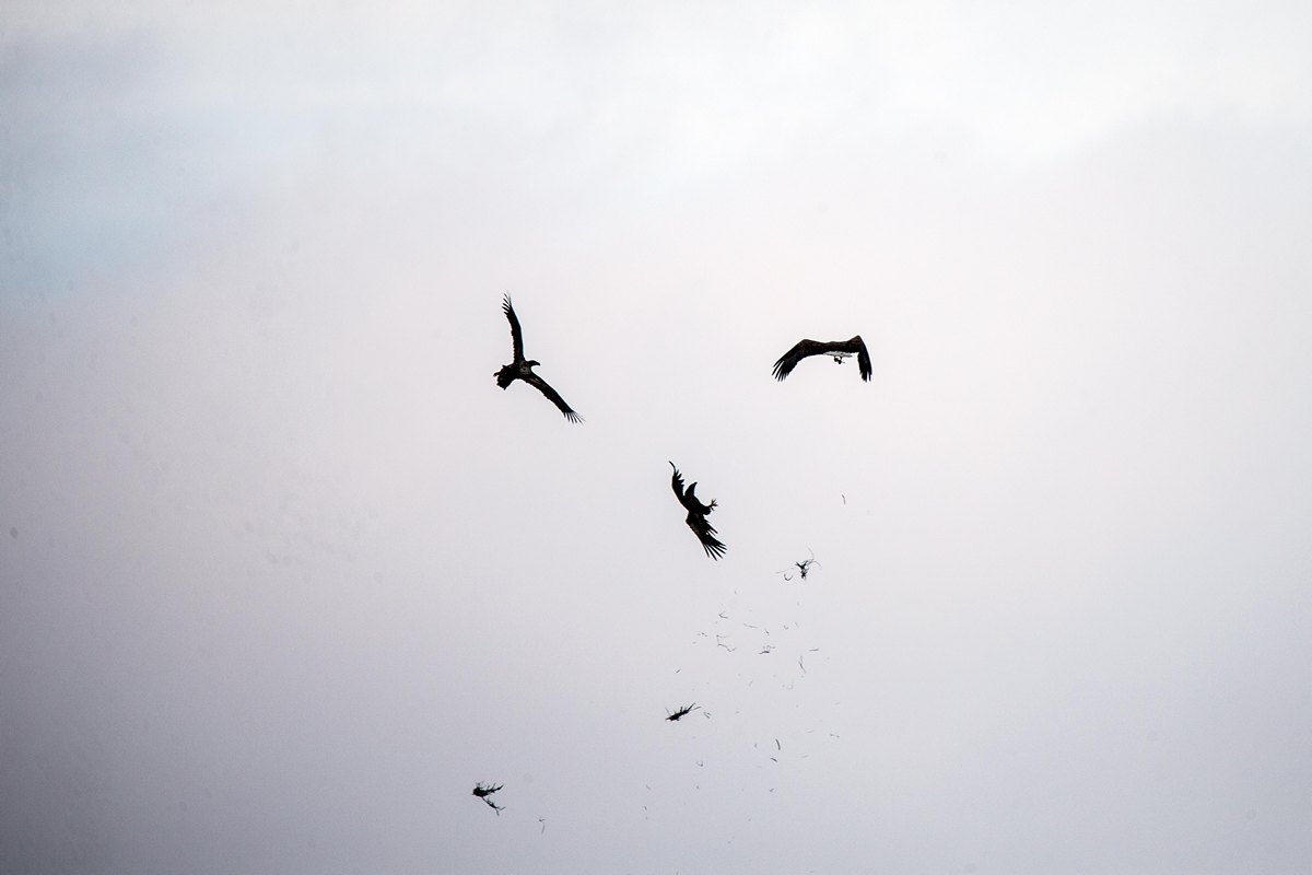 Luftkampf von zwei Adlern um eine Partnerin